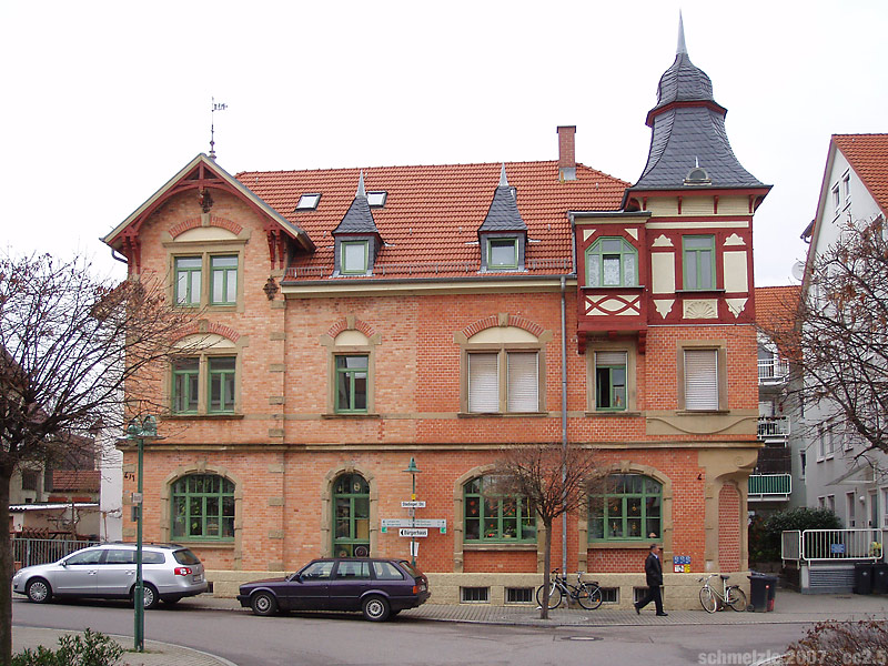 Historisches Gasthaus „Lamm“ in der Stedinger Straße 4 in Heilbronn-Böckingen